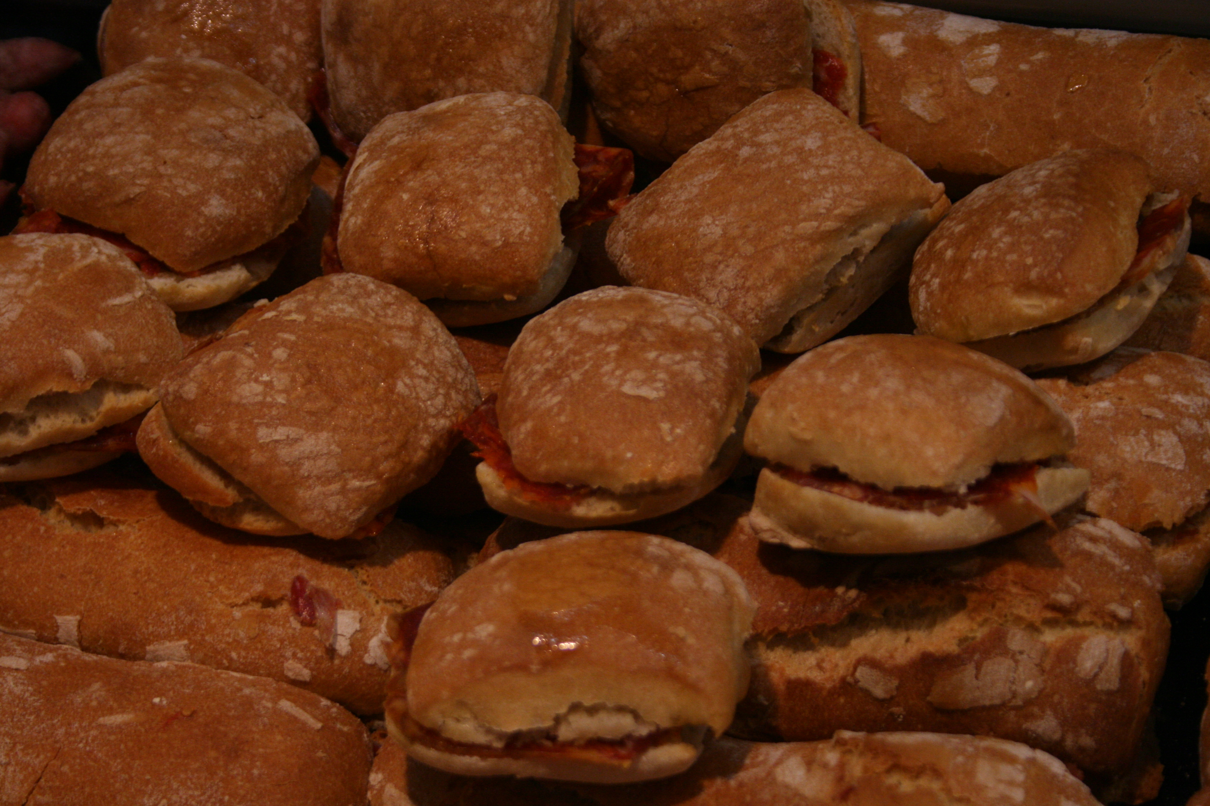 Bocadillo de chorizo (apilamiento) - bocadillos